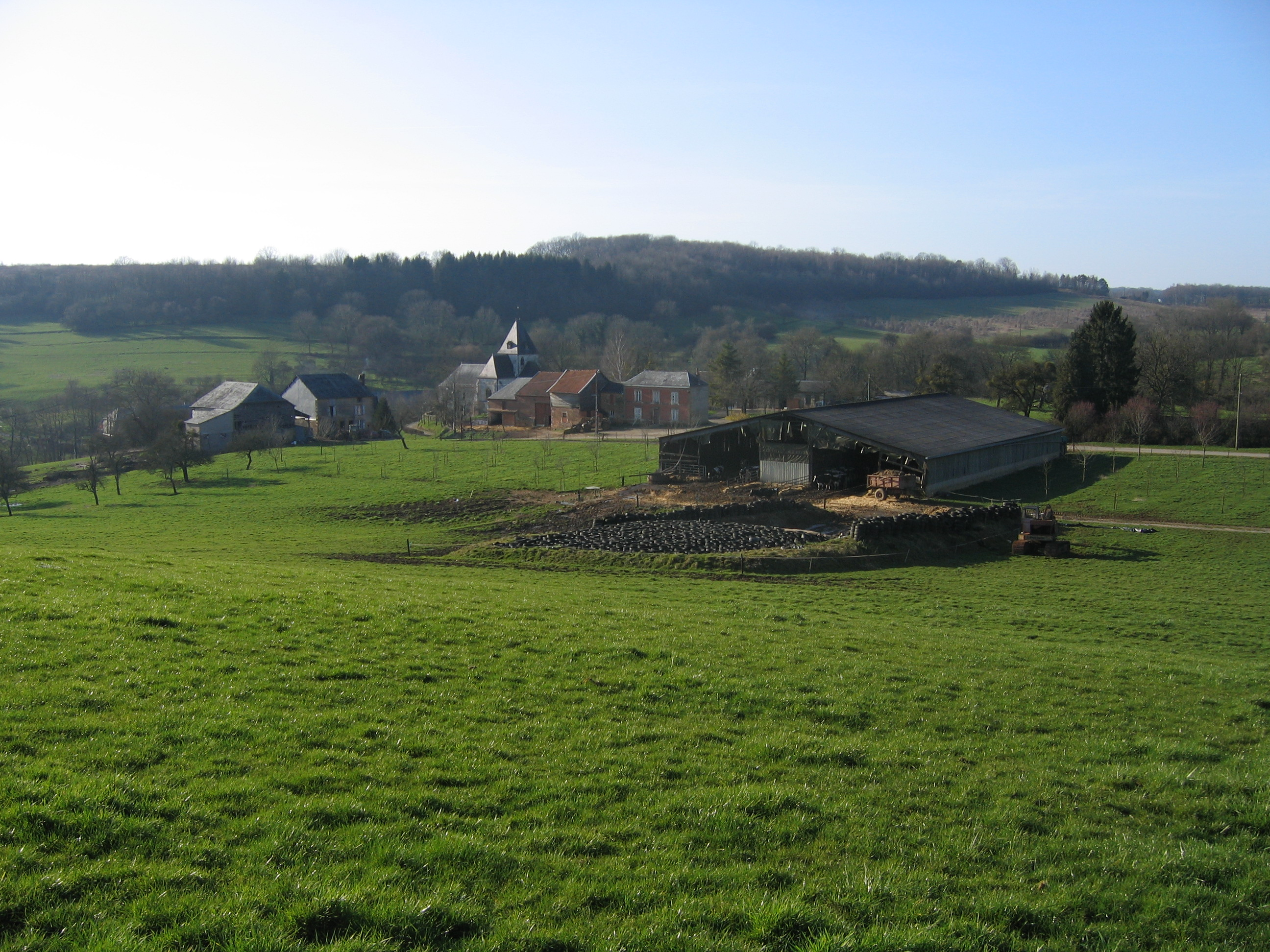 Vue de Hagnicourt (Ardennes, France).